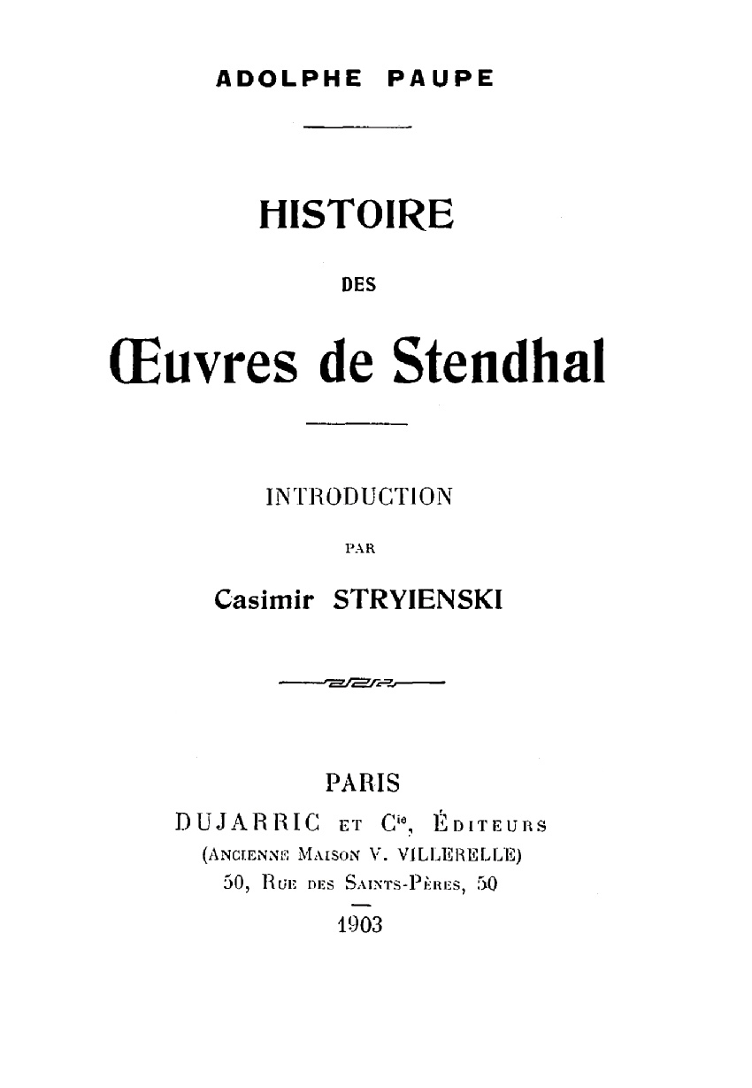 Adolphe Paupe, Histoire des œuvres de Stendhal, 1903 ; préface de Casimir Stryienski